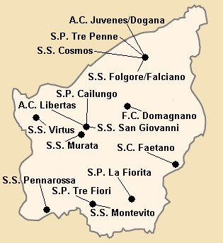 Répartition des clubs du championnat de Saint-marin avant 2005.